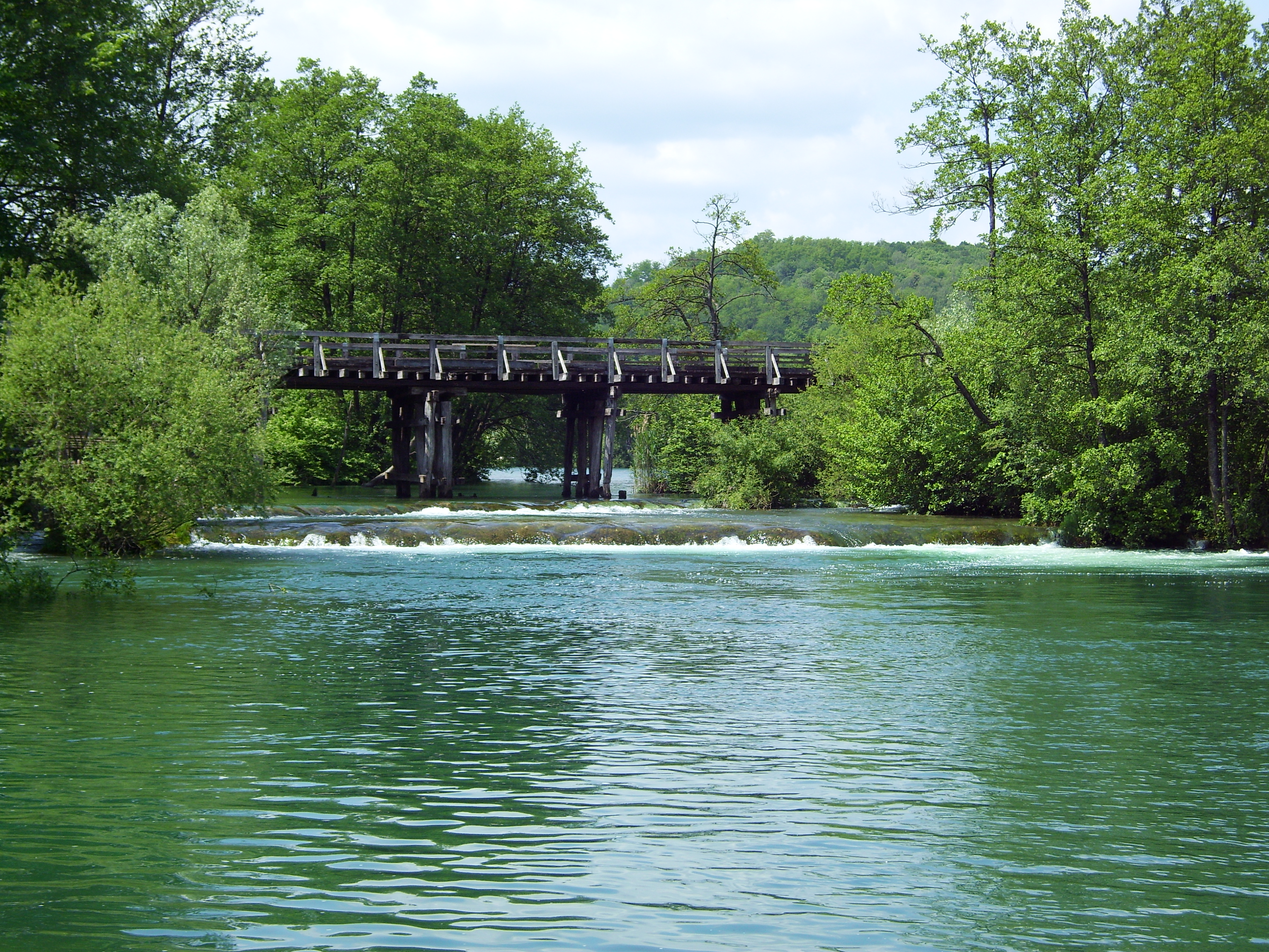 Einfach nur Herrlich